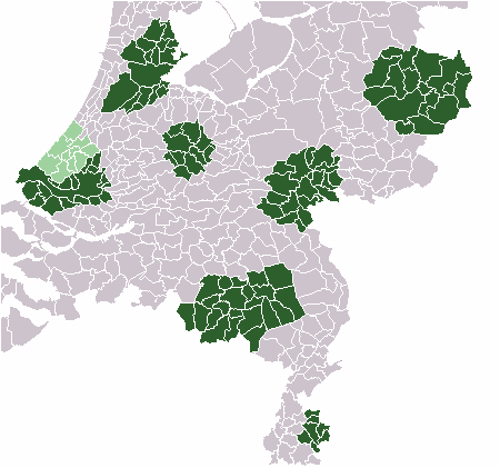 Kaart met kaderwetgebieden